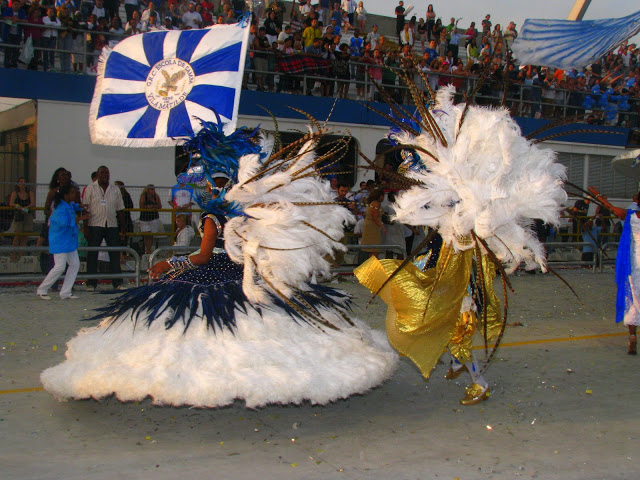 GRCES Nenê de Vila Matilde, 2009.